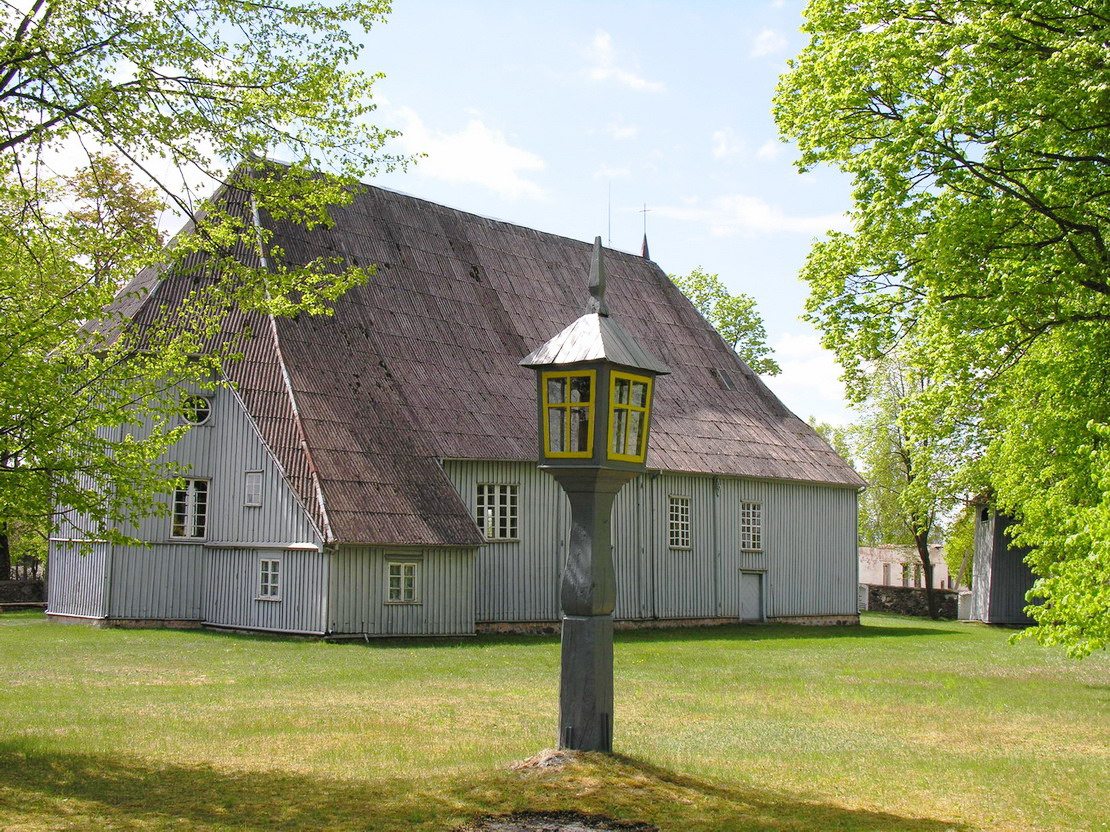 Šventorius Foto: Algirdas, 2006 m. gegužės 17 d., Lietuva